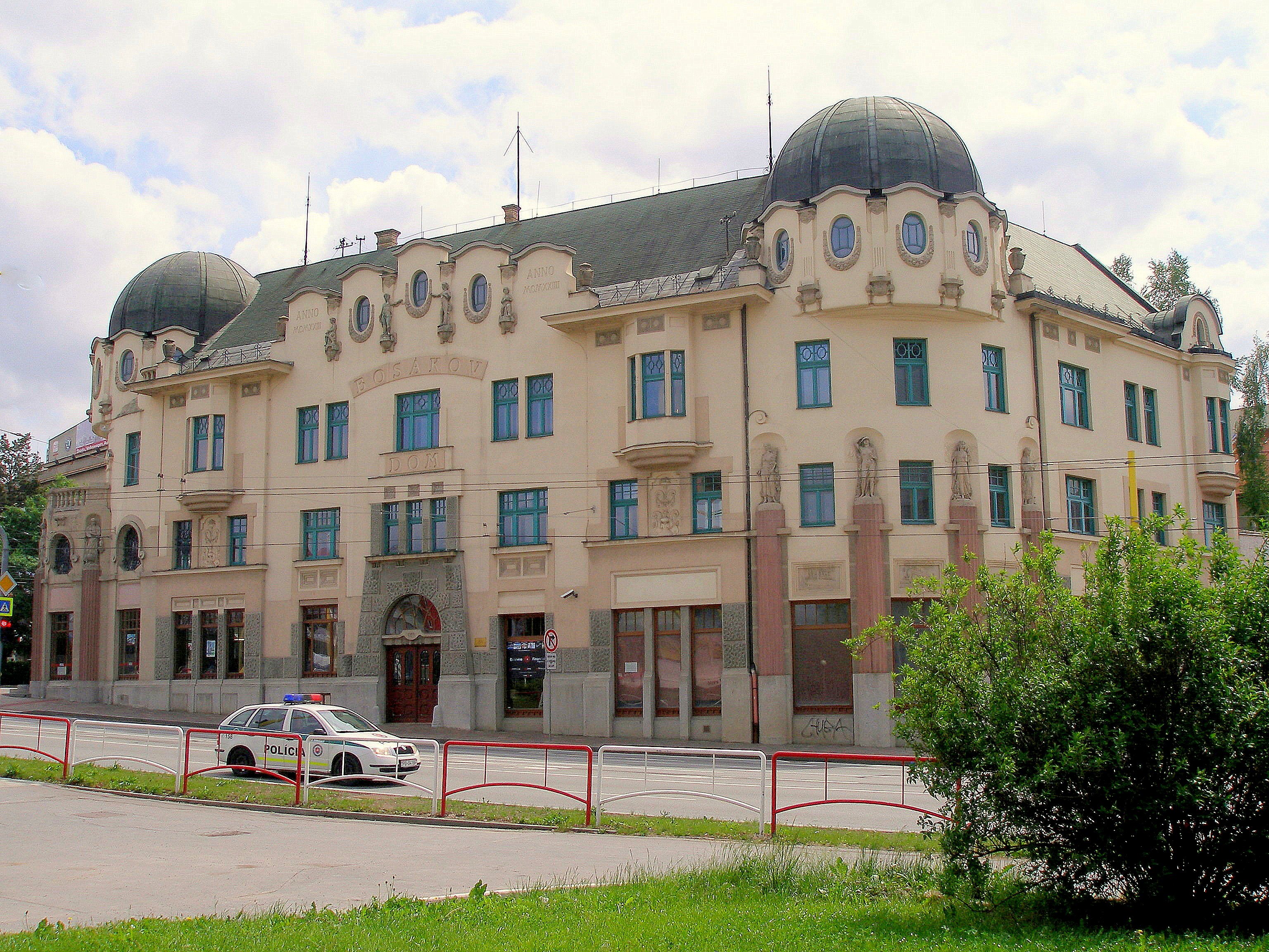 Bosákov dom. Mesto Prešov, ulica Levočská